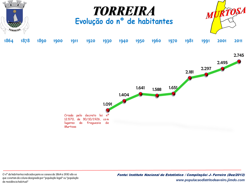 Evolução da População 1864 / 2011